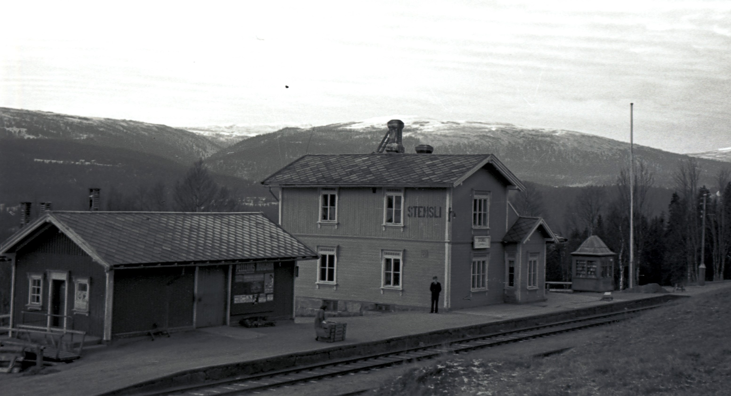 Stensli stasjon på Rørosbanen fotografert i 1945